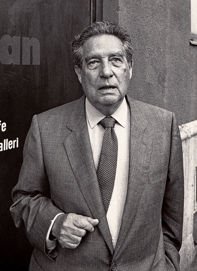 Octavio Paz besökte Malmö Internationella Poesifestival 1988.